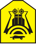 Герб города Караганды до 2007 г